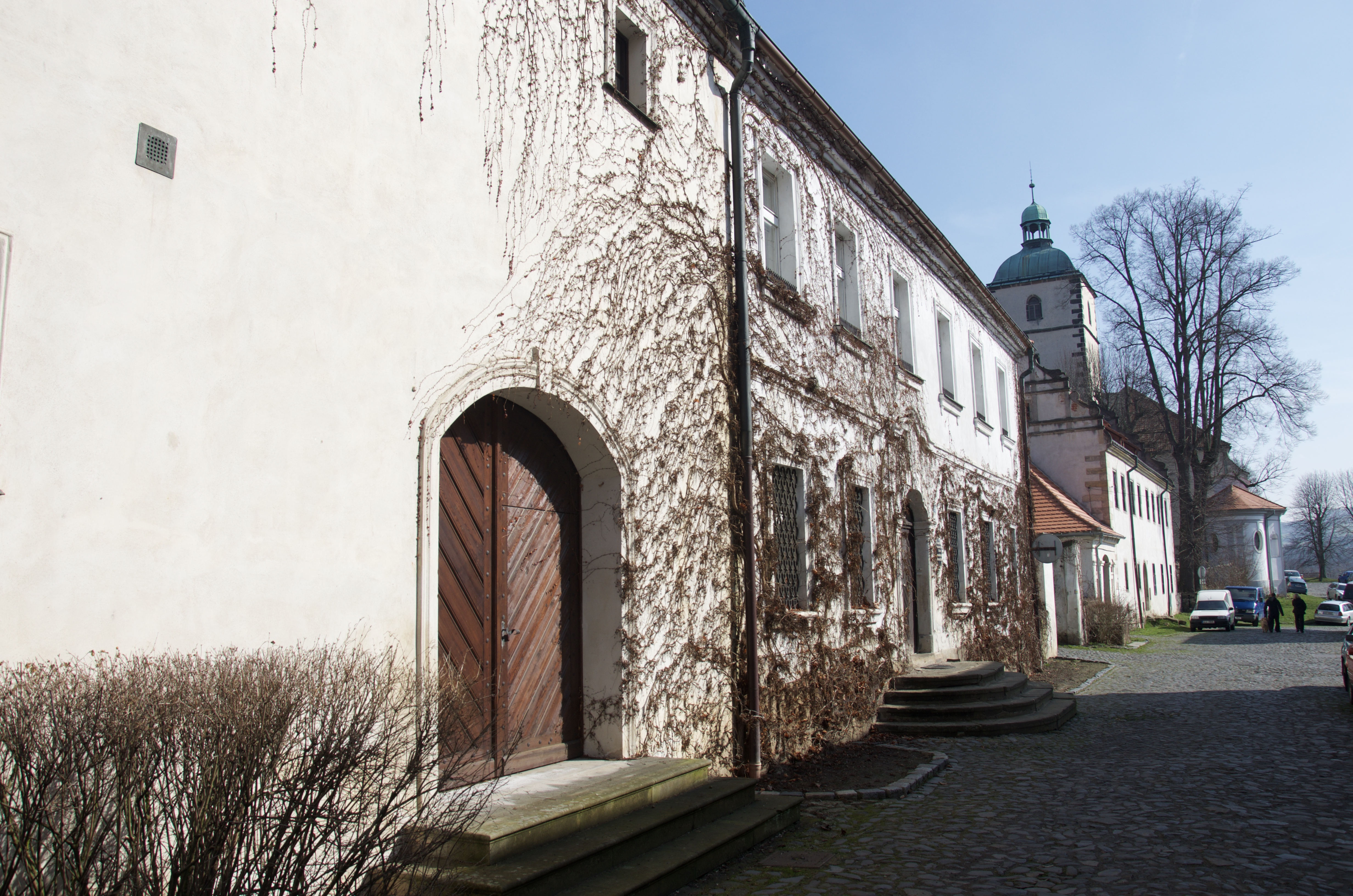 Pohled na šlechtická sídla situovaných vedle horního zámku s Konojedským domem v pozadí.